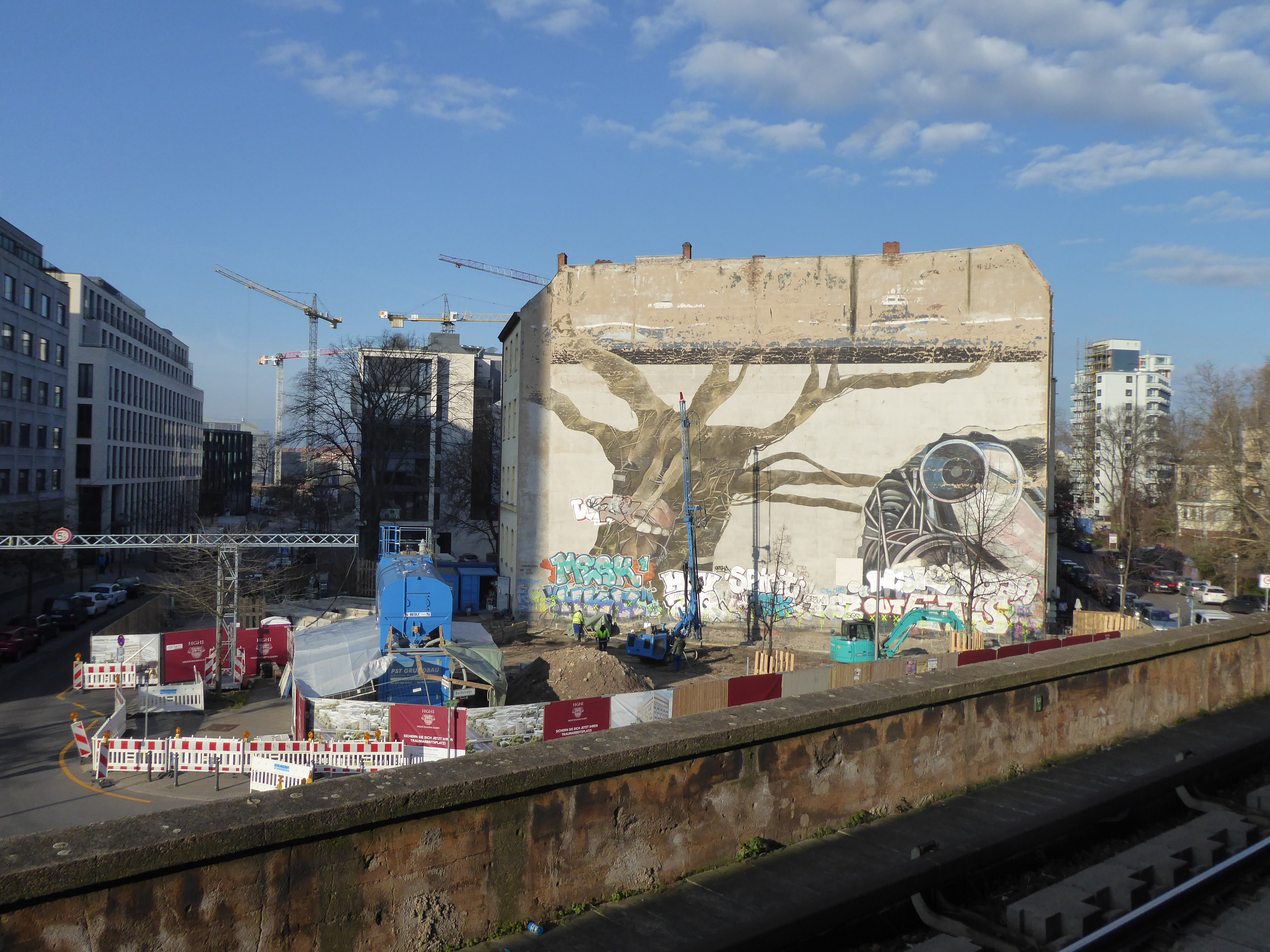 Charlottenburg Bachstraße Weltbaum I von Ben Wagin